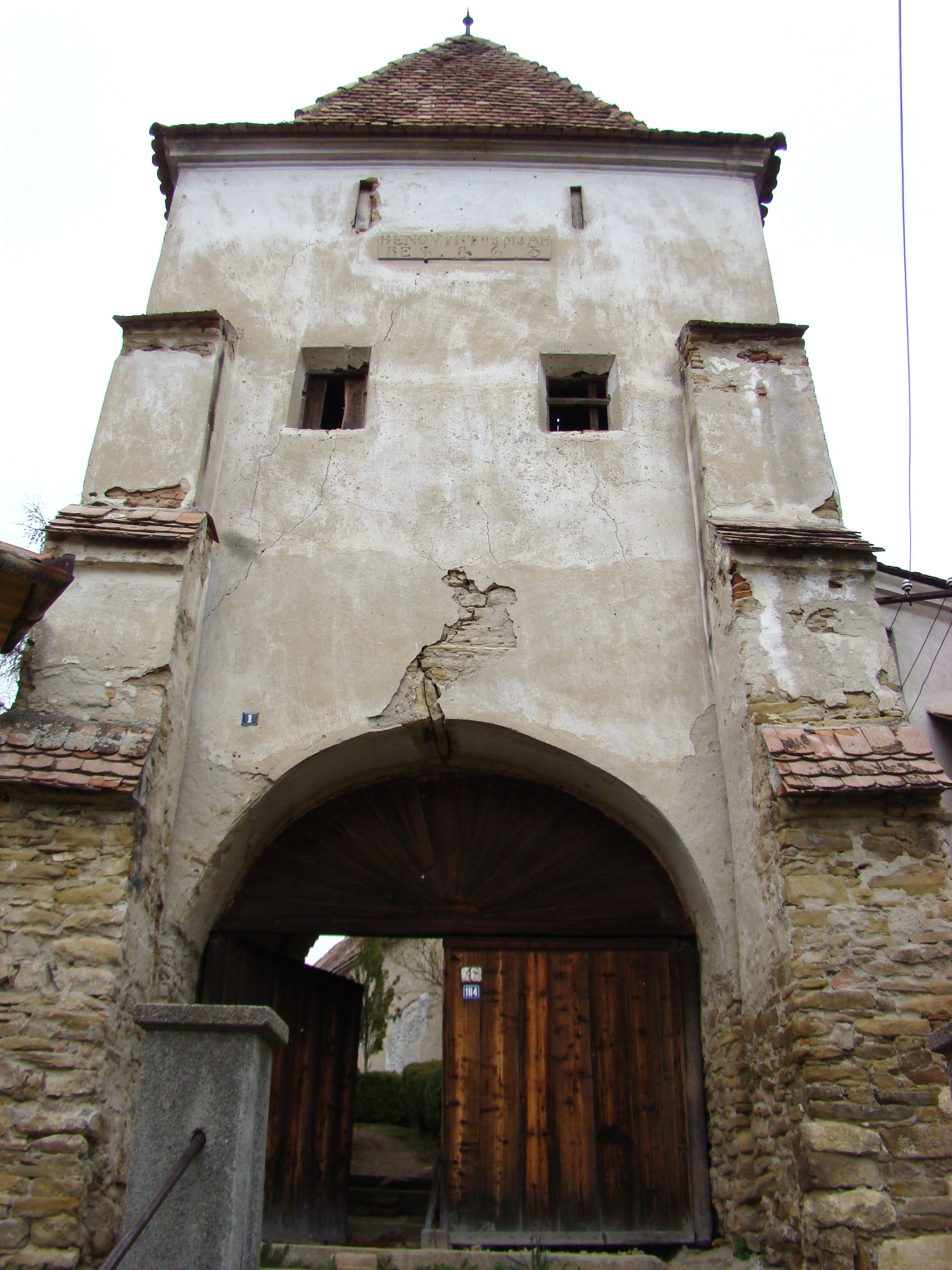 Ansamblul bisericii evanghelice fortificate, sat CURCIU; comuna DÂRLOS